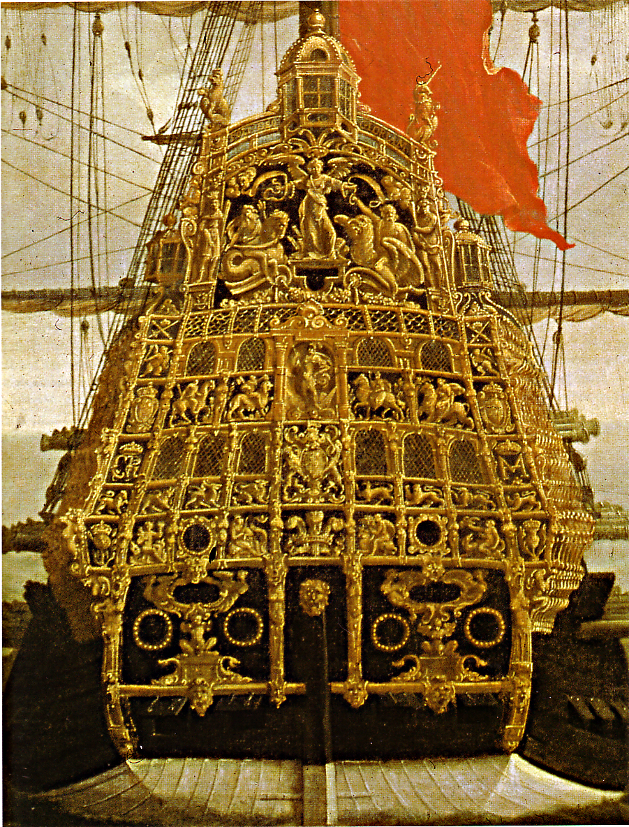 Heck der Sovereign of the Seas